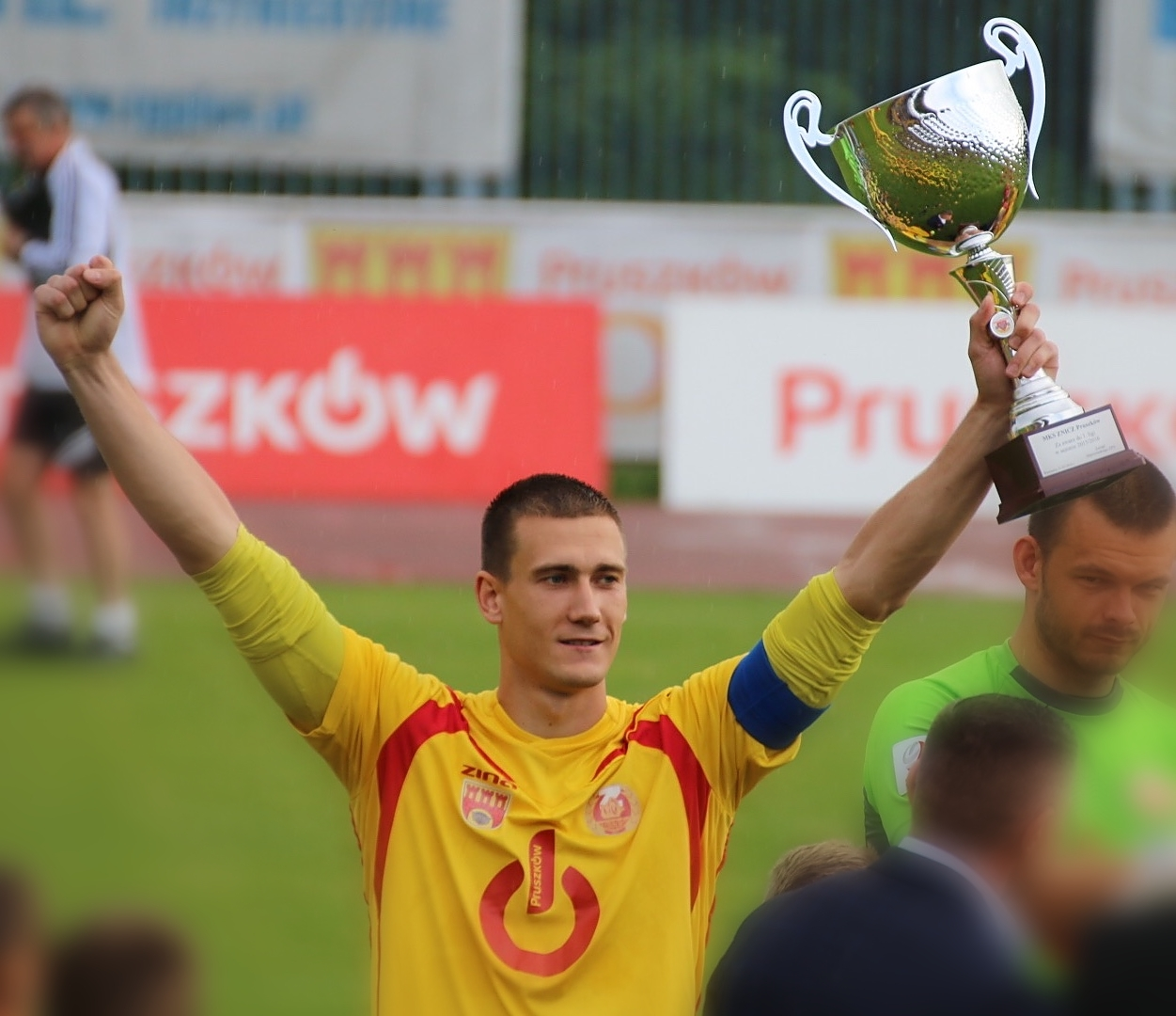 Arkadiusz Jędrych z Pucharem za awans drużyny Znicza Pruszków do I ligi